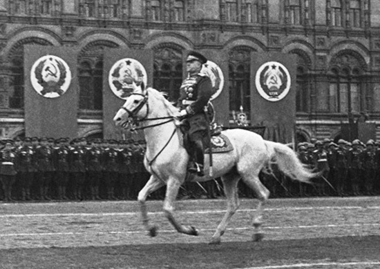 Георгий Константинович Жуков (1896 — 1974). Парад Победы. 24 июня 1945 г